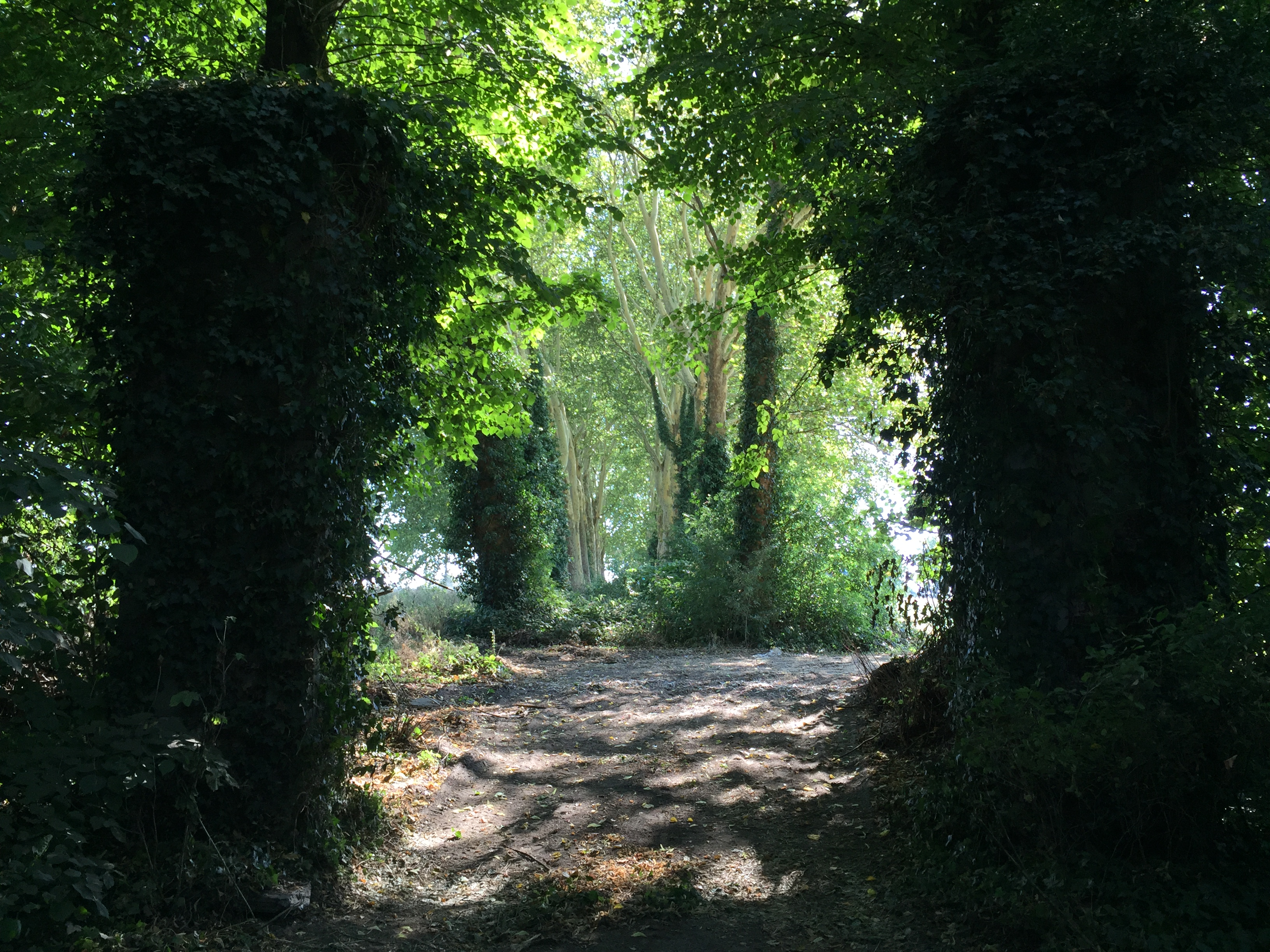 Getrokken in augustus 2018, tijdens een wandeltocht.